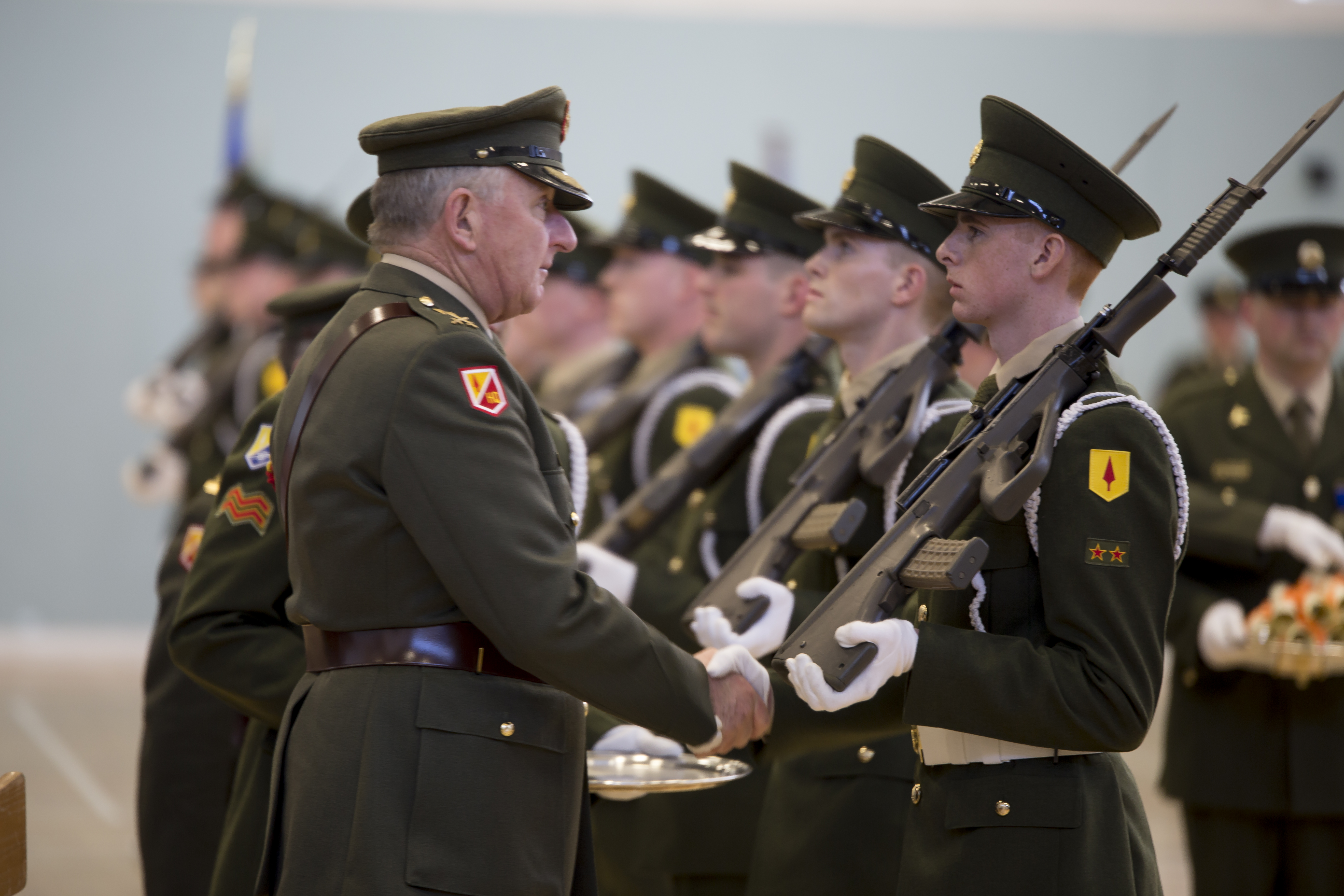 2 AR 1st Rec Pln